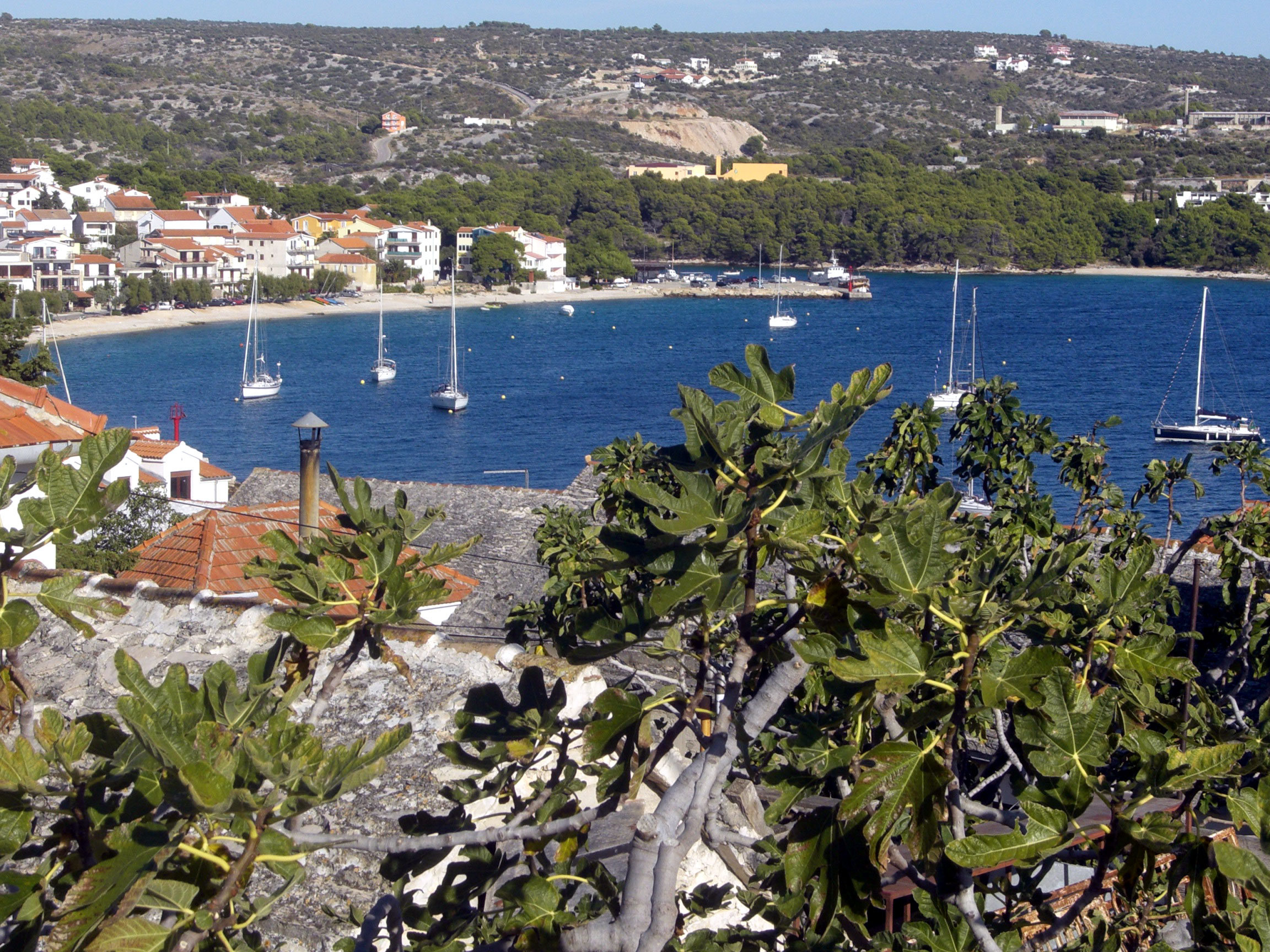 Primošten, Hrvatska